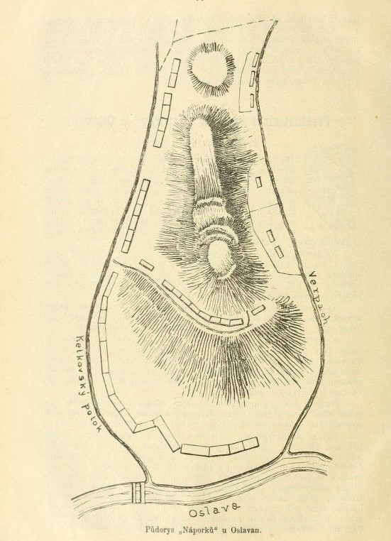 Nákres návrší Náporky nacházejícího se u řeky Oslavy z časopisu Vlasteneckého muzejního spolku v Olomouci